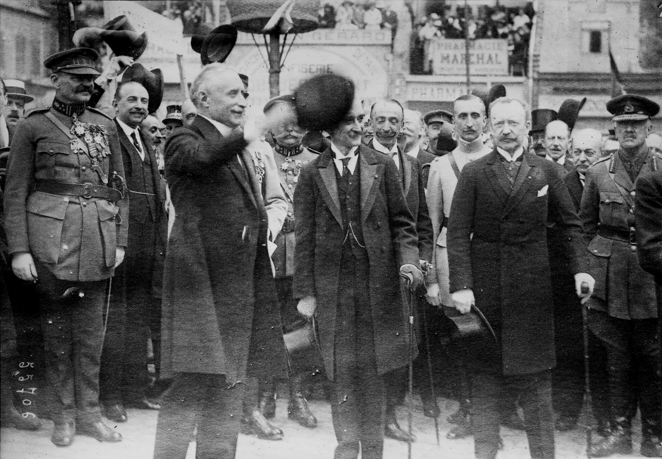 Paul Deschanel lors des commémorations du 23 août 1919 date anniversaire du sac de Dinant